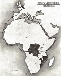 Exploratiounsreesen vum E. Luja. Source: Bulletin de la SNL 55.